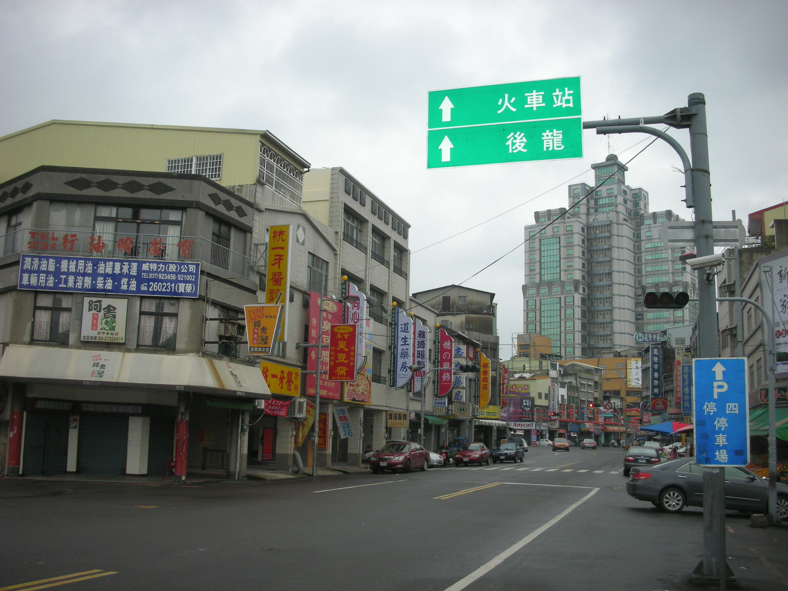 苗栗市市街